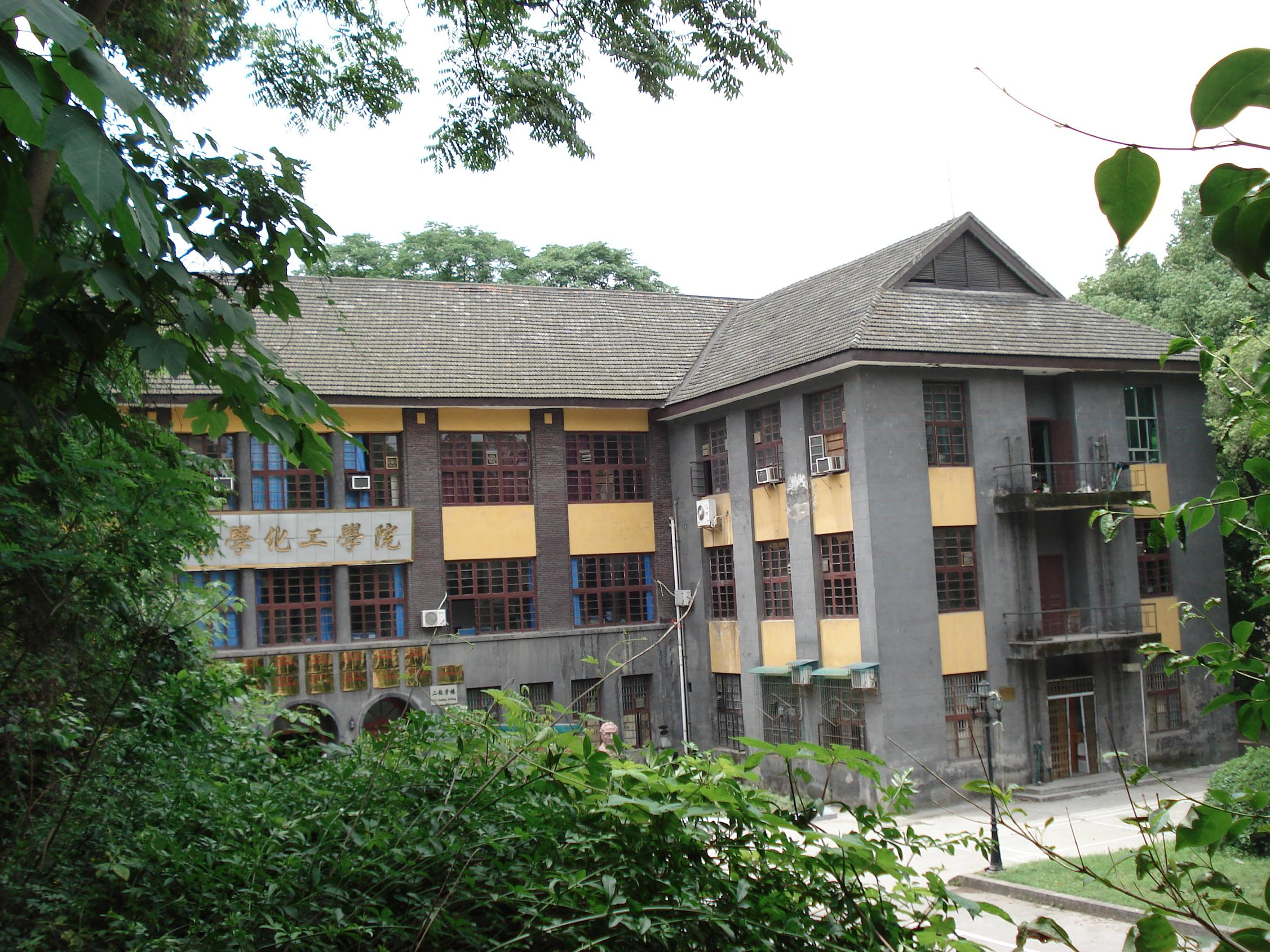 西南大學化學化工學院，該校早期建築代表